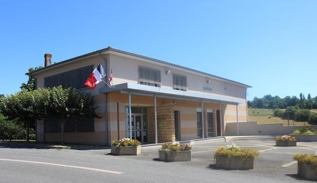 Entrée de la Mairie de Landorthe